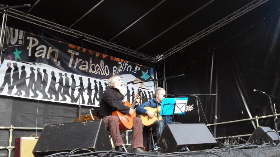 Mini e Mero. 29N Marcha da Dignidade. Santiago de Compostela 2014.